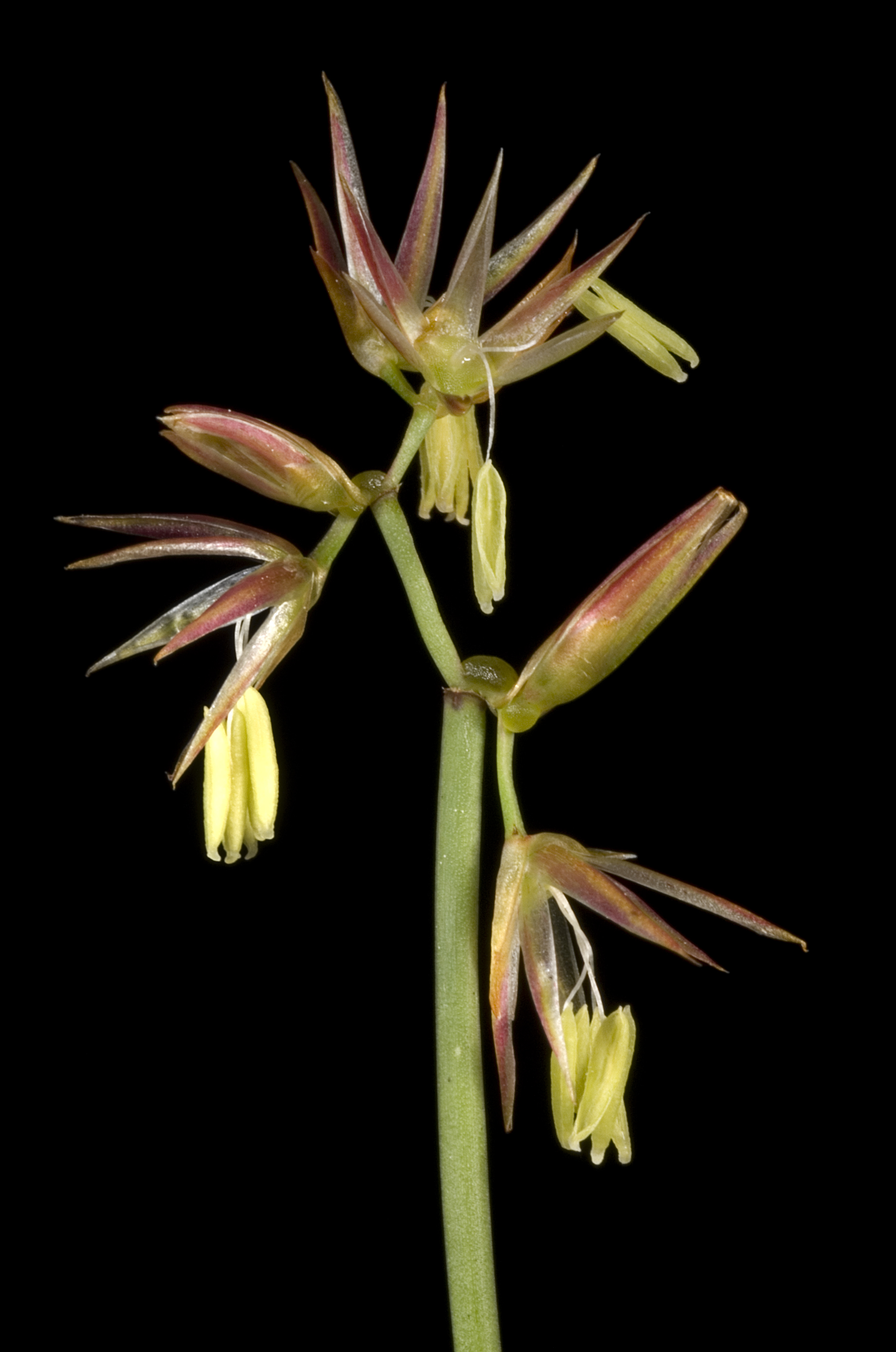 KRT3304